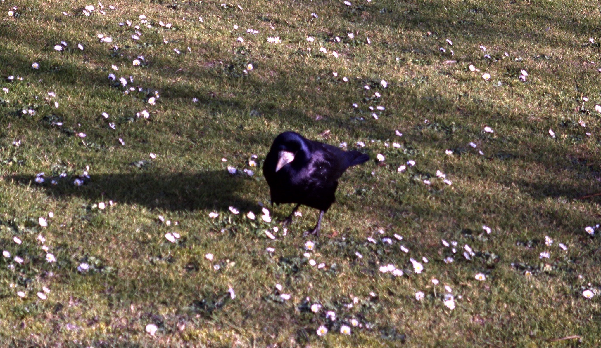 Corvus frugilegus Saatkrähe. Bláhrafn.